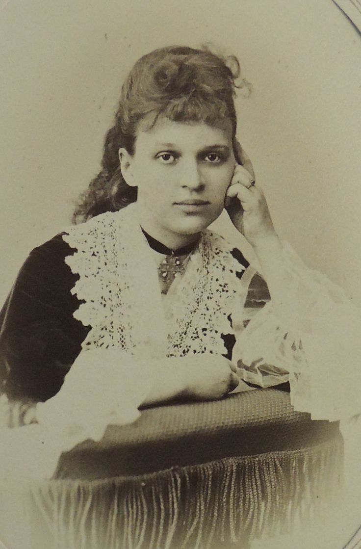 Княгиня Екатерина Петровна Кудашёва, урождённая Демидова (1838— ?)